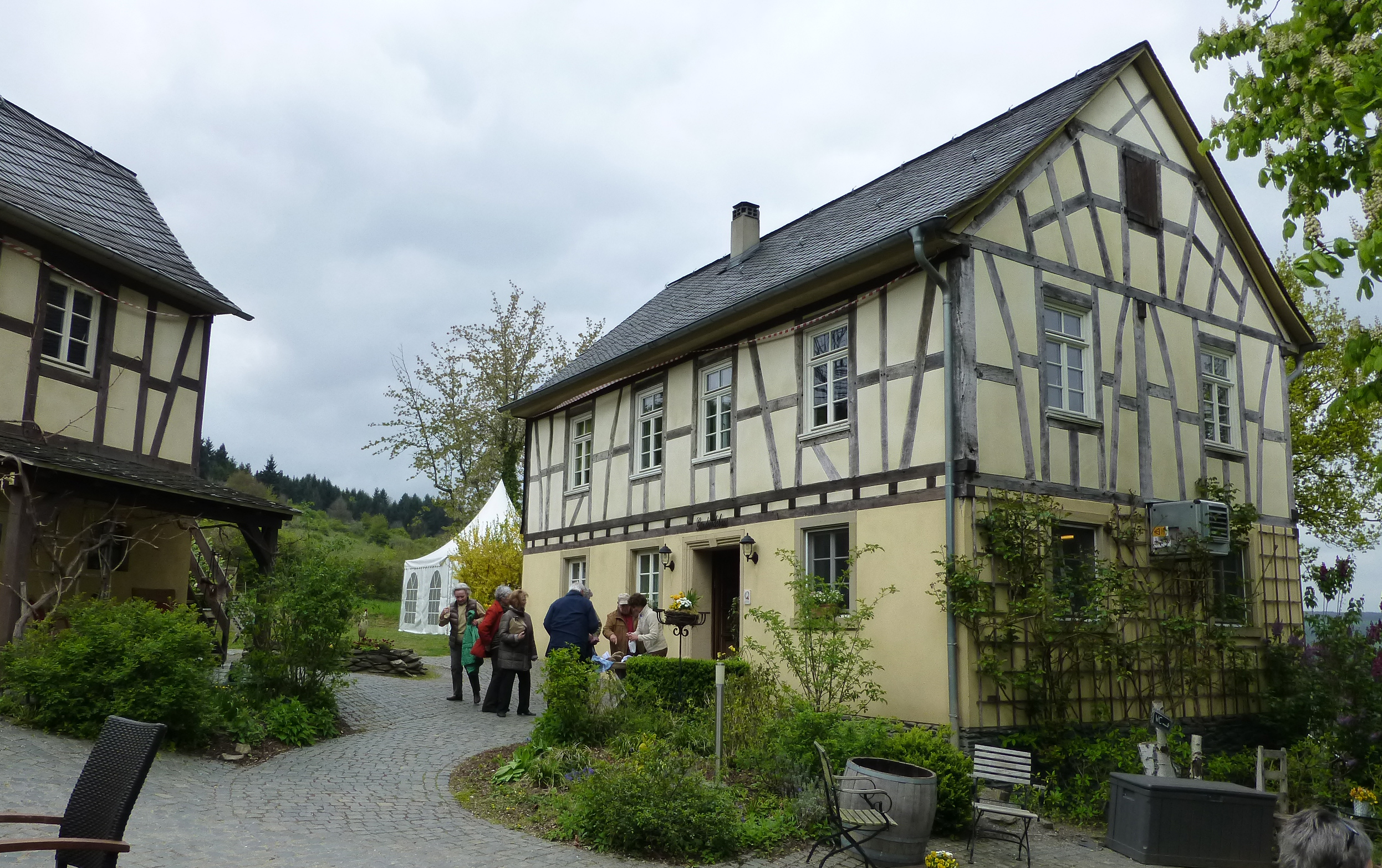 Maison construite pour le film Heimat 3. Point de vue superbe sur Oberwesel.